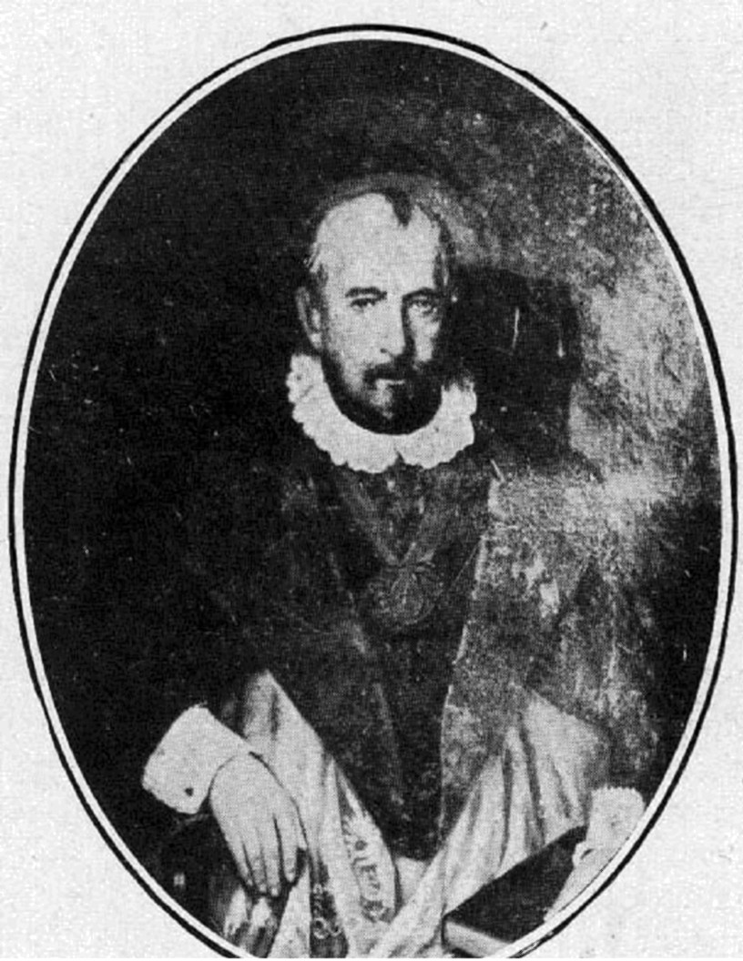 Juan Francisco Meneses (1785 – 1860) político y sacerdote chileno